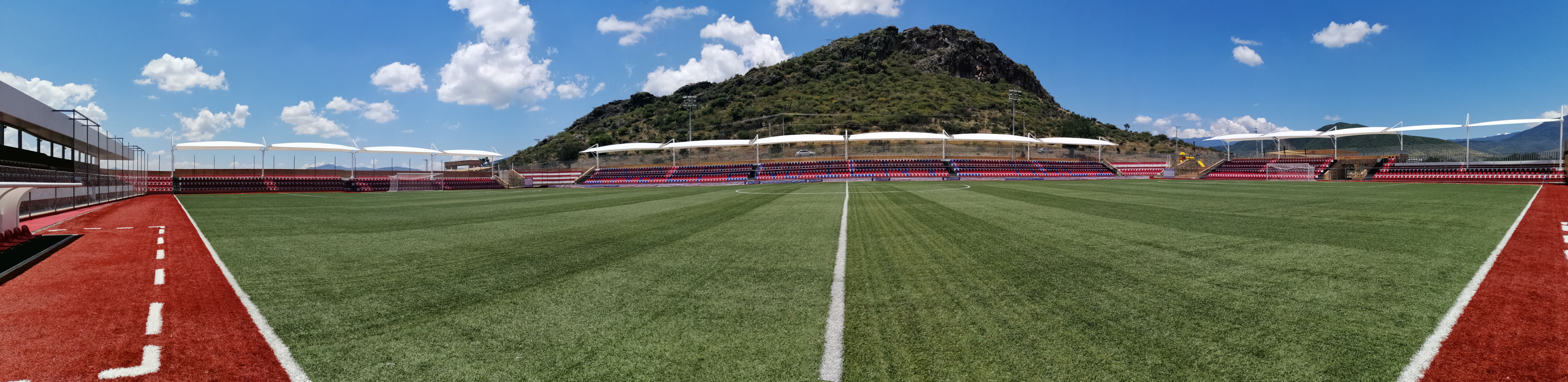 Fotografía panoramica del estadio independiente MRCI